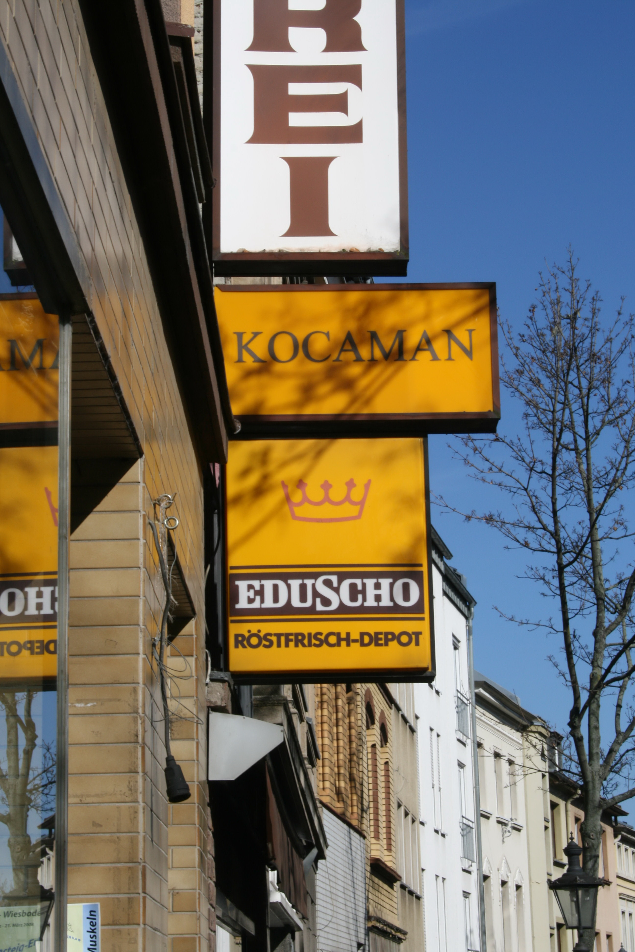 Typische Leuchtreklame der ehemaligen Fa. EDUSCHO Kaffee an einem Depot in einer (inzwischen geschlossenen) Bonner Bäckerei, Endenicher Str.